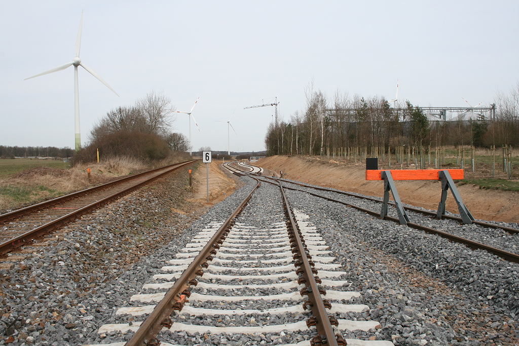 Anschlussstelle der EOP Biodiesel AG in Falkenhagen (Prignitz)